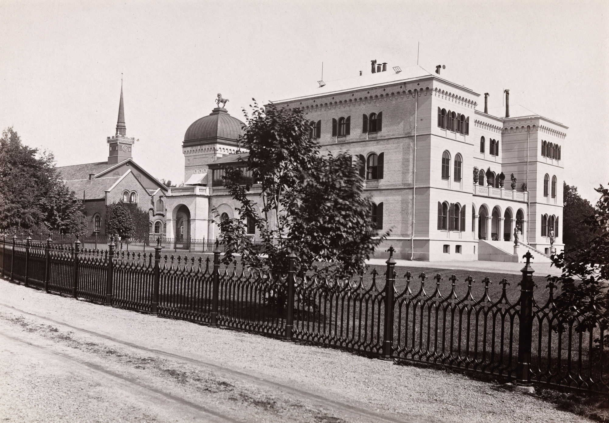 Tittel / Title: 2104. Laurvig, Fritzøehus Beskrivelse / Description: Fritzøehus er et slott i Larvik som ble tegnet av Jacob Wilhelm Nordan og bygget av Michael Treschow i årene 1863–1865. Gården har siden vært eid av medlemmer av slekten Treschow. (Wikipedia) Dato / Date: 1880-1890 Fotograf / Photographer: Axel Lindahl (1841-1906) Sted / Place: Vestfold, Larvik, Fritzøehus park Eier / Owner Institution: Nasjonalbiblioteket / National Library of Norway Lenke / Link: Bildesignatur / Image Number: bldsa_AL2104